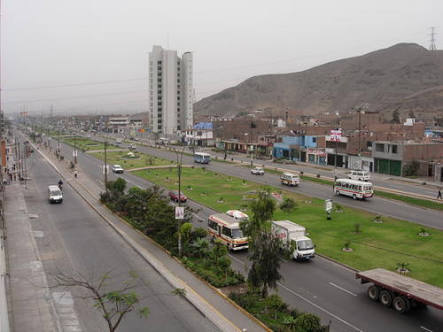 Avenida Universitaria